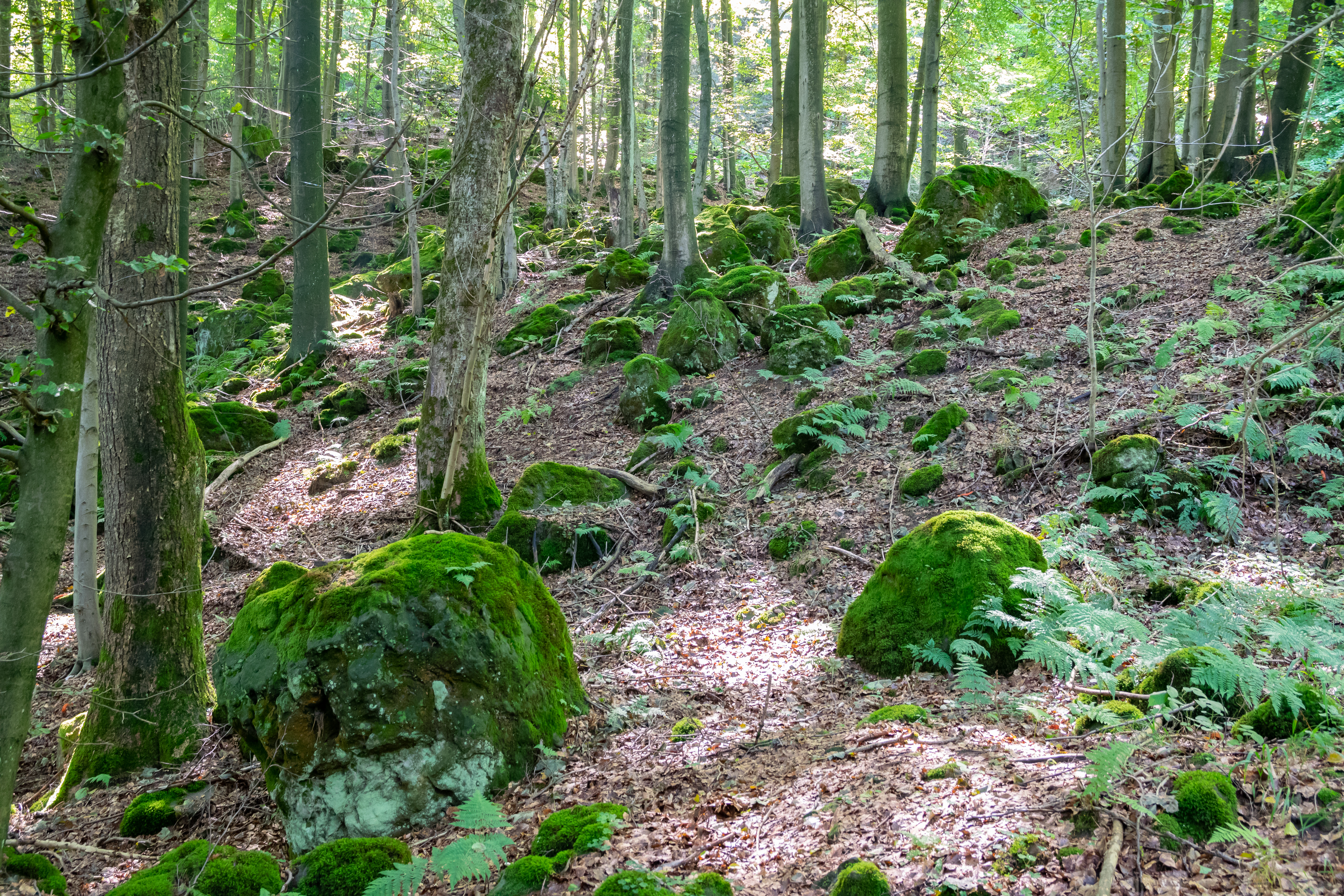 Naturschutzgebiet Klippen und Felsenmeer bei Hardehausen in Warburg-Scherfede, Kreis Höxter